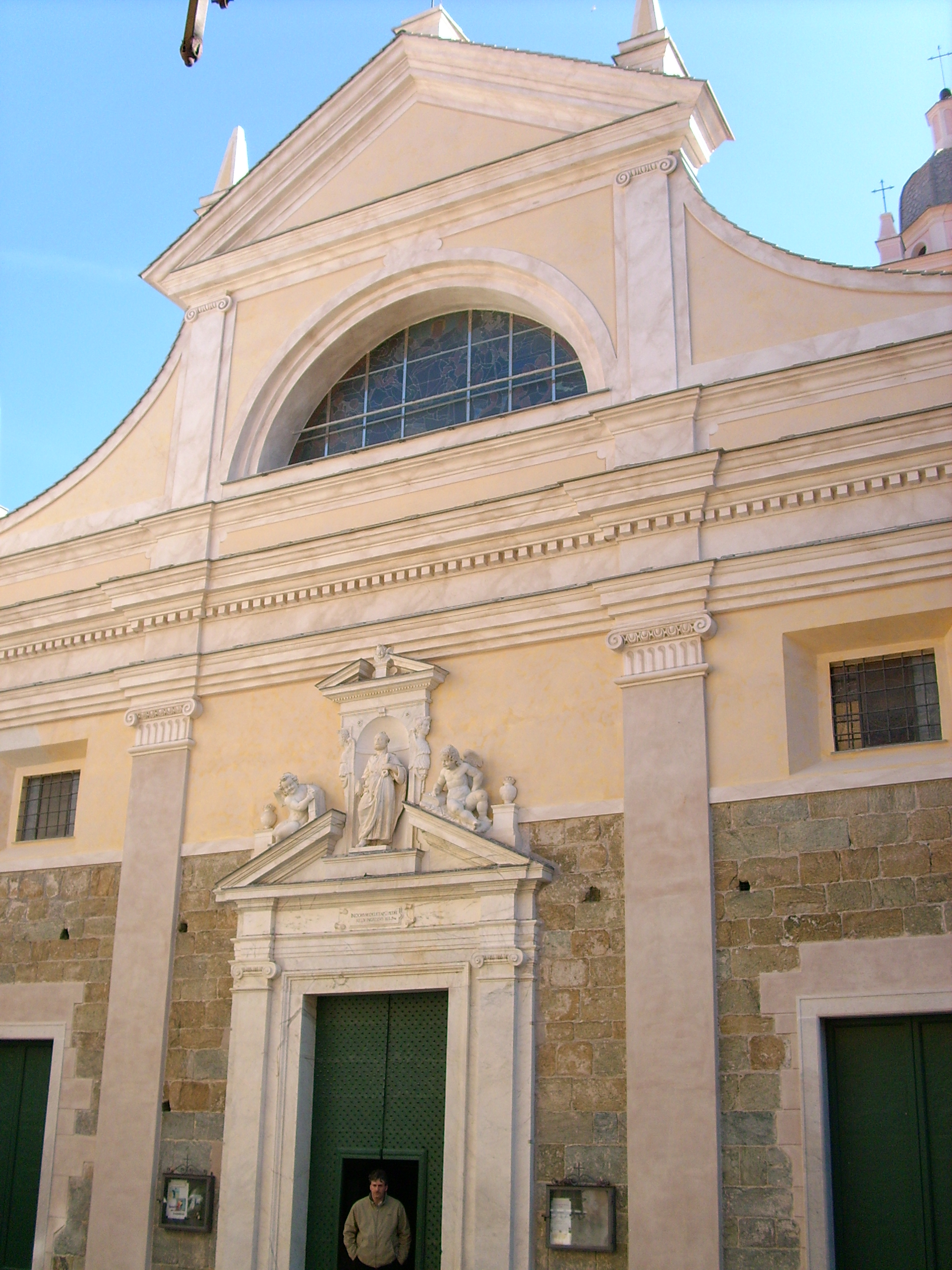 Cattedrale di San Pietro presso Noli, Liguria, Italy